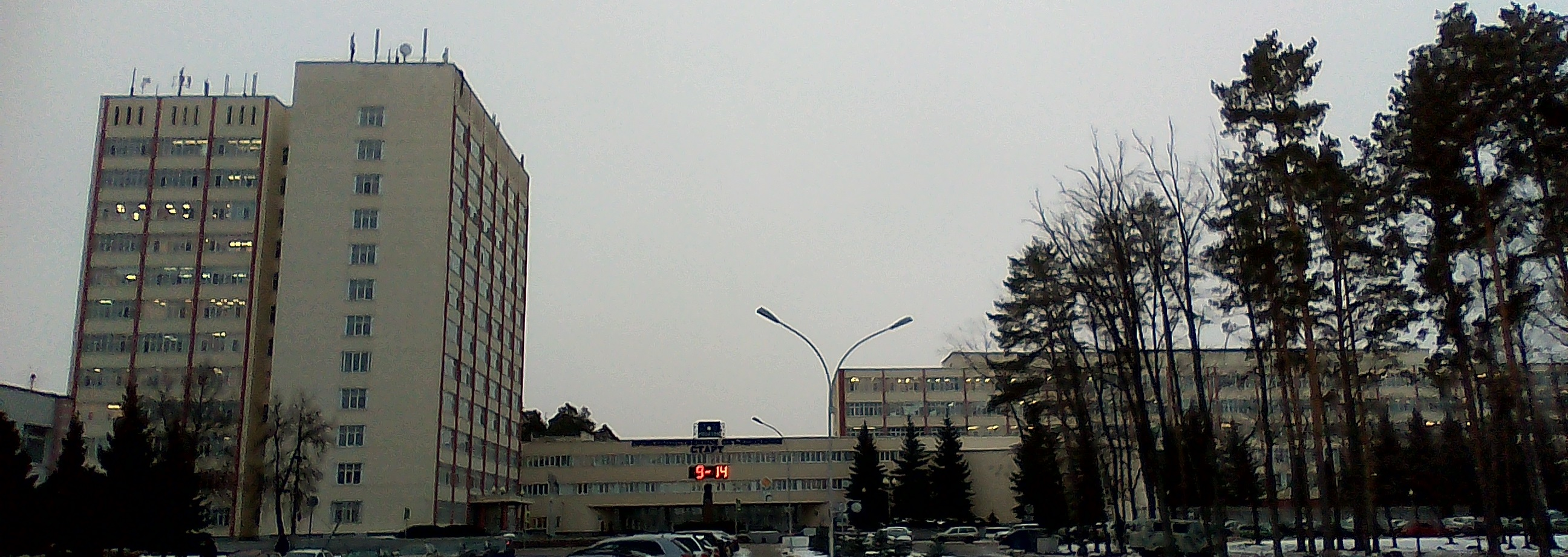 улица Проценко